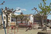 Plaça del mercat de Bellcaire d'Urgell